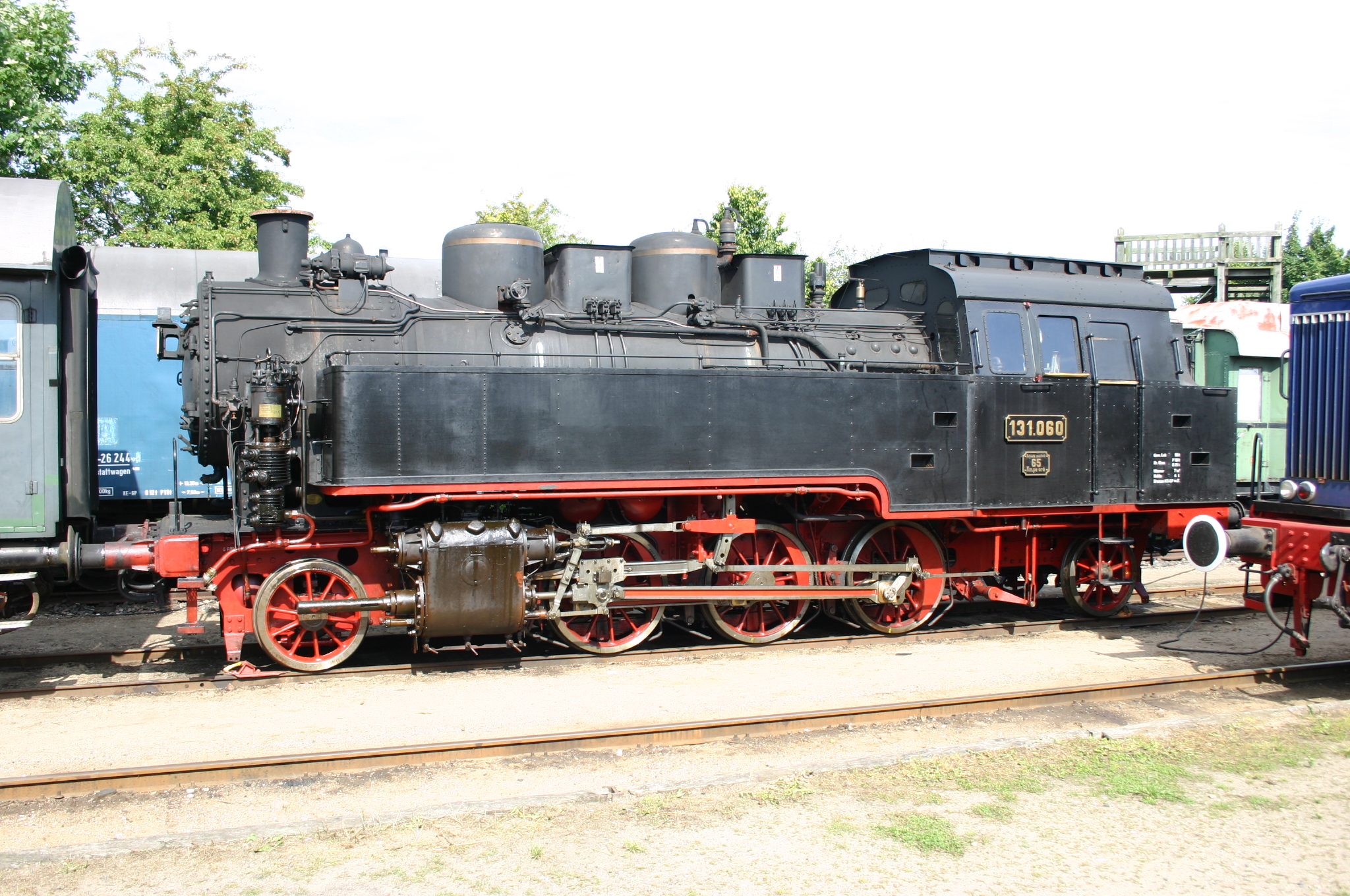 Dampflokomotive 131.060, Schönberger Strand